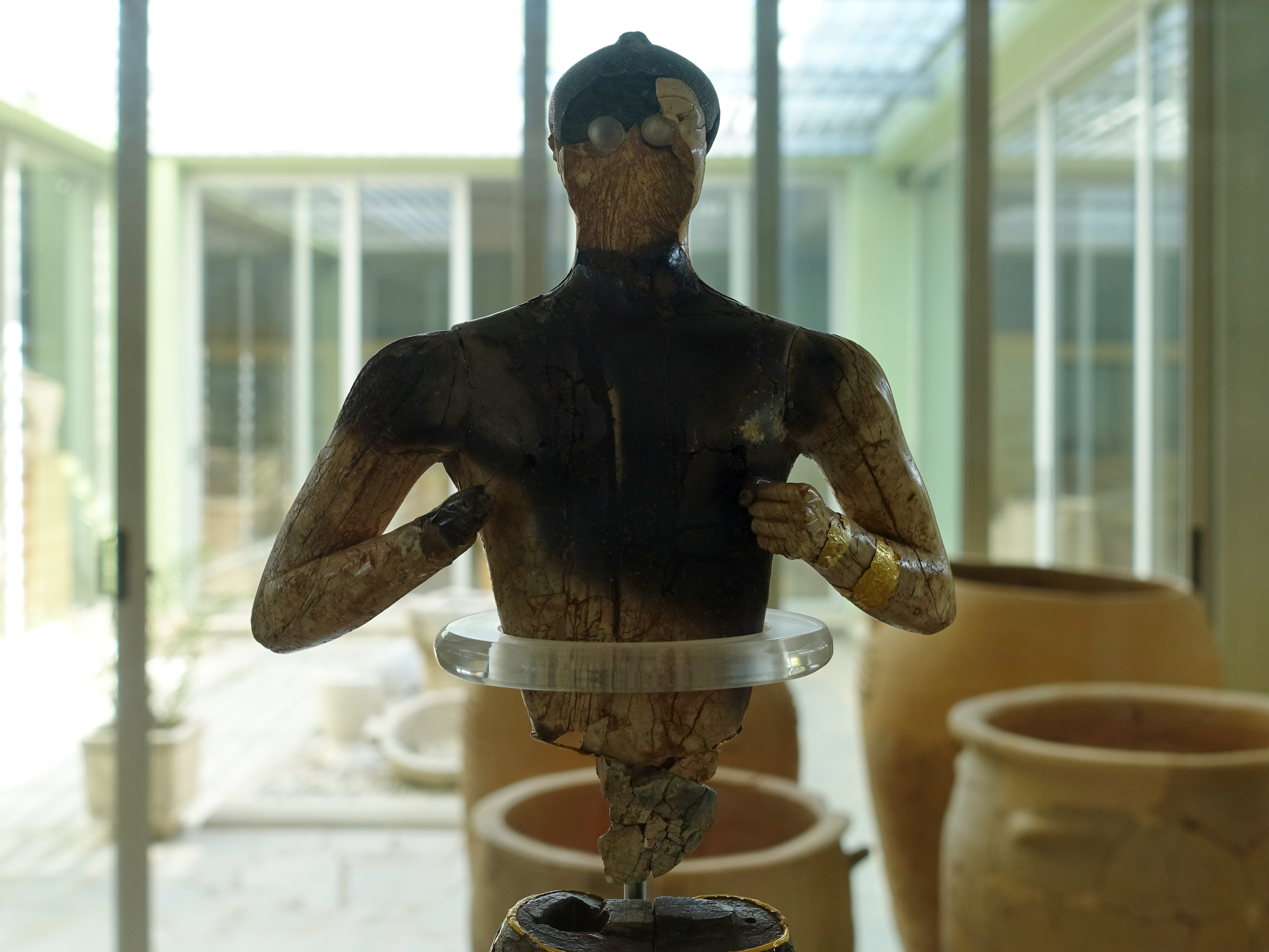 Kouros von Palaikastro (1480–1425 v. Chr.), minoische Götterstatue aus Haus 5 der Ausgrabungsstätte von Roussolakkos, Archäologisches Museum von Sitia, Kreta, Griechenland